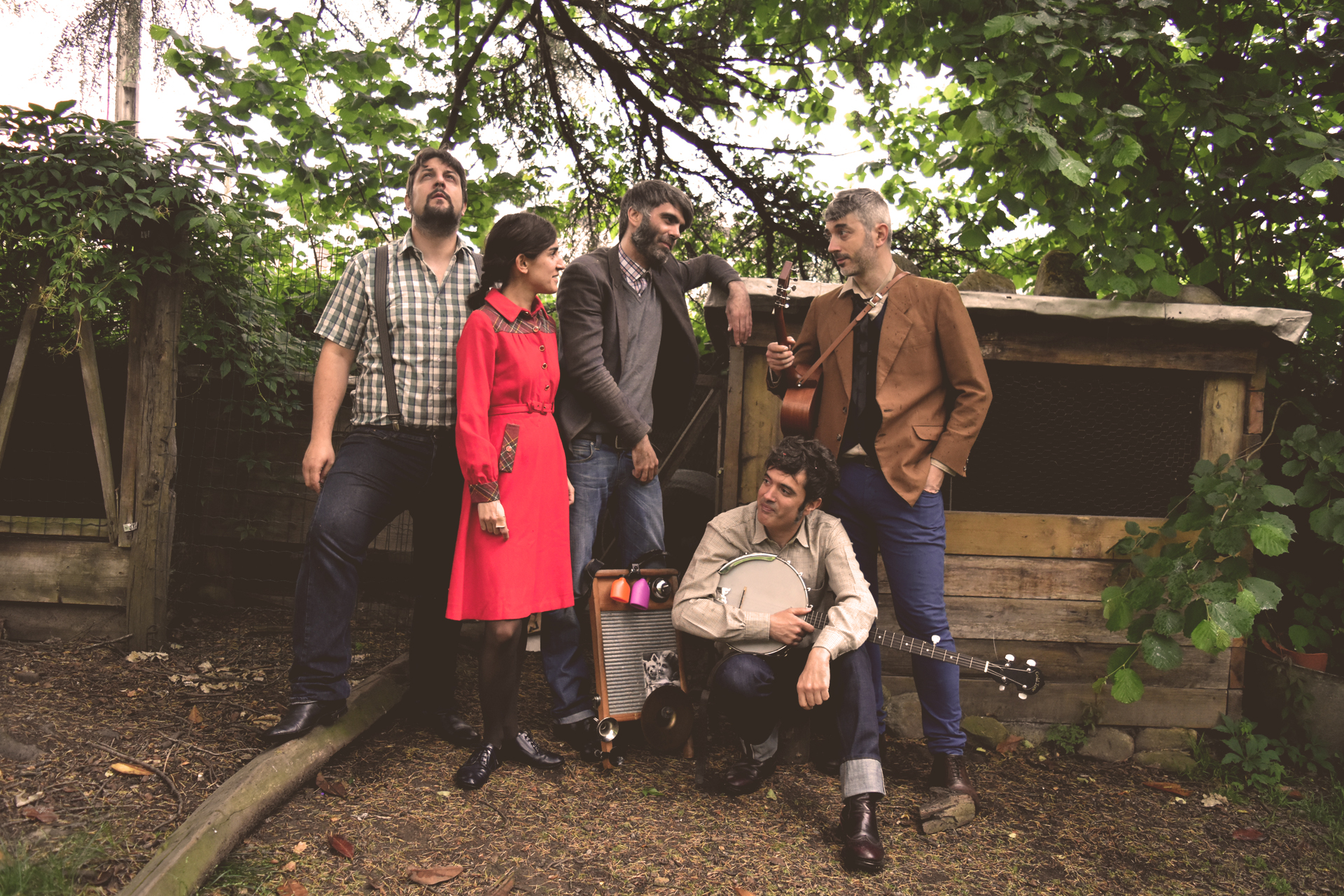 Foto de la banda Dr. Maha's Miracle Tonicen 2016